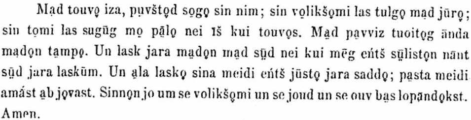 Pater noster prayer in eastern Livonian